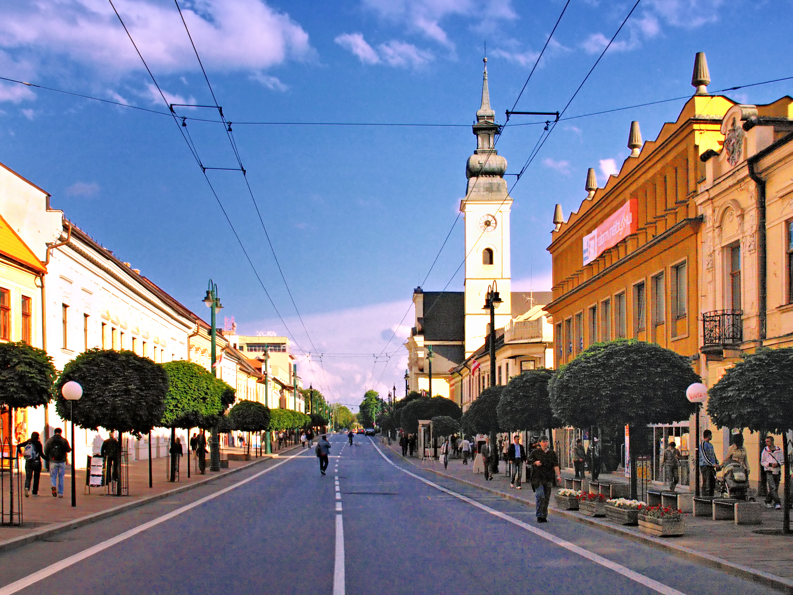 Prešov rue principale Hlvanà